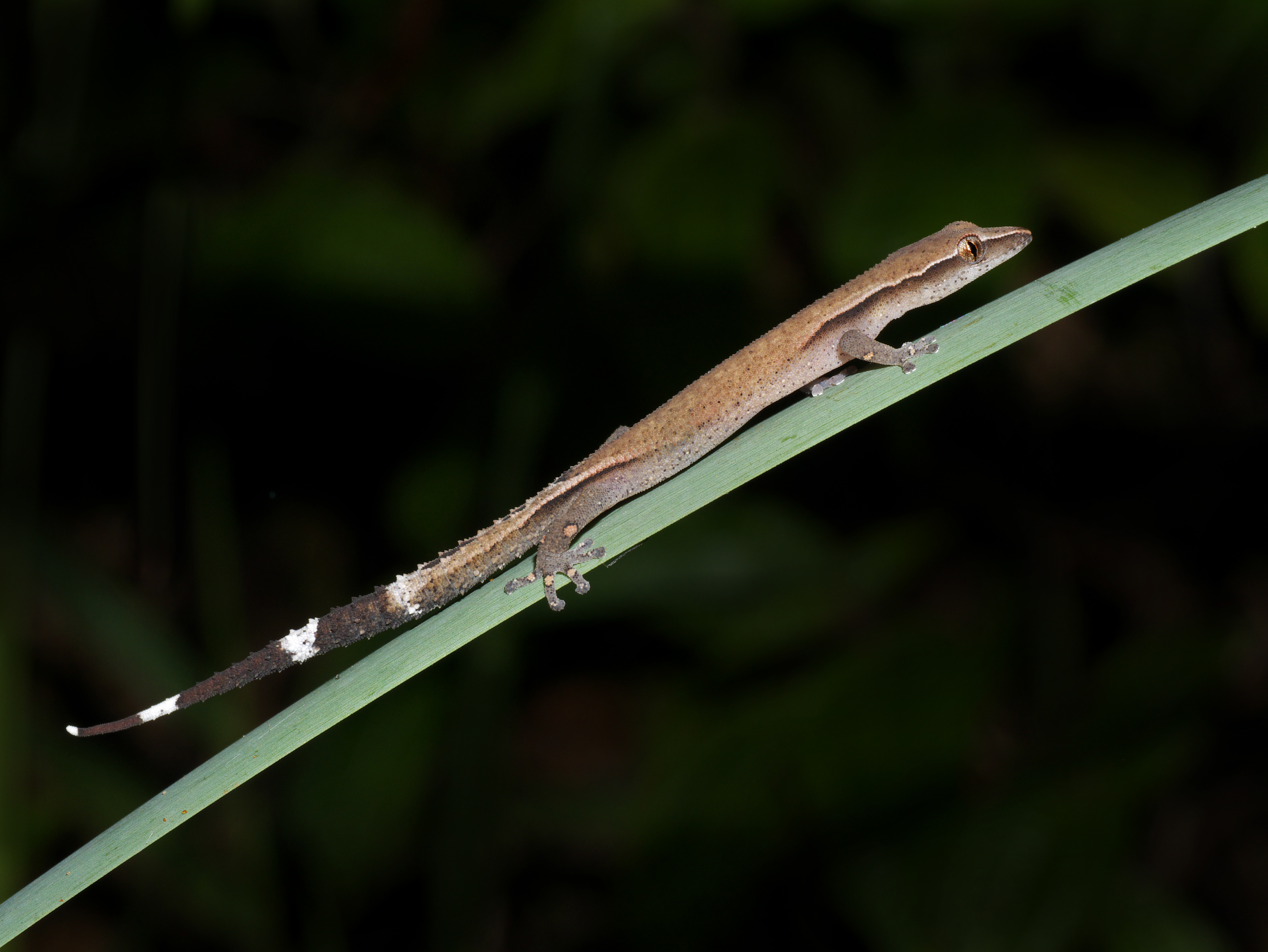 Madagascar clawless gecko (Ebenavia inunguis), Vohimana reserve, Madagascar